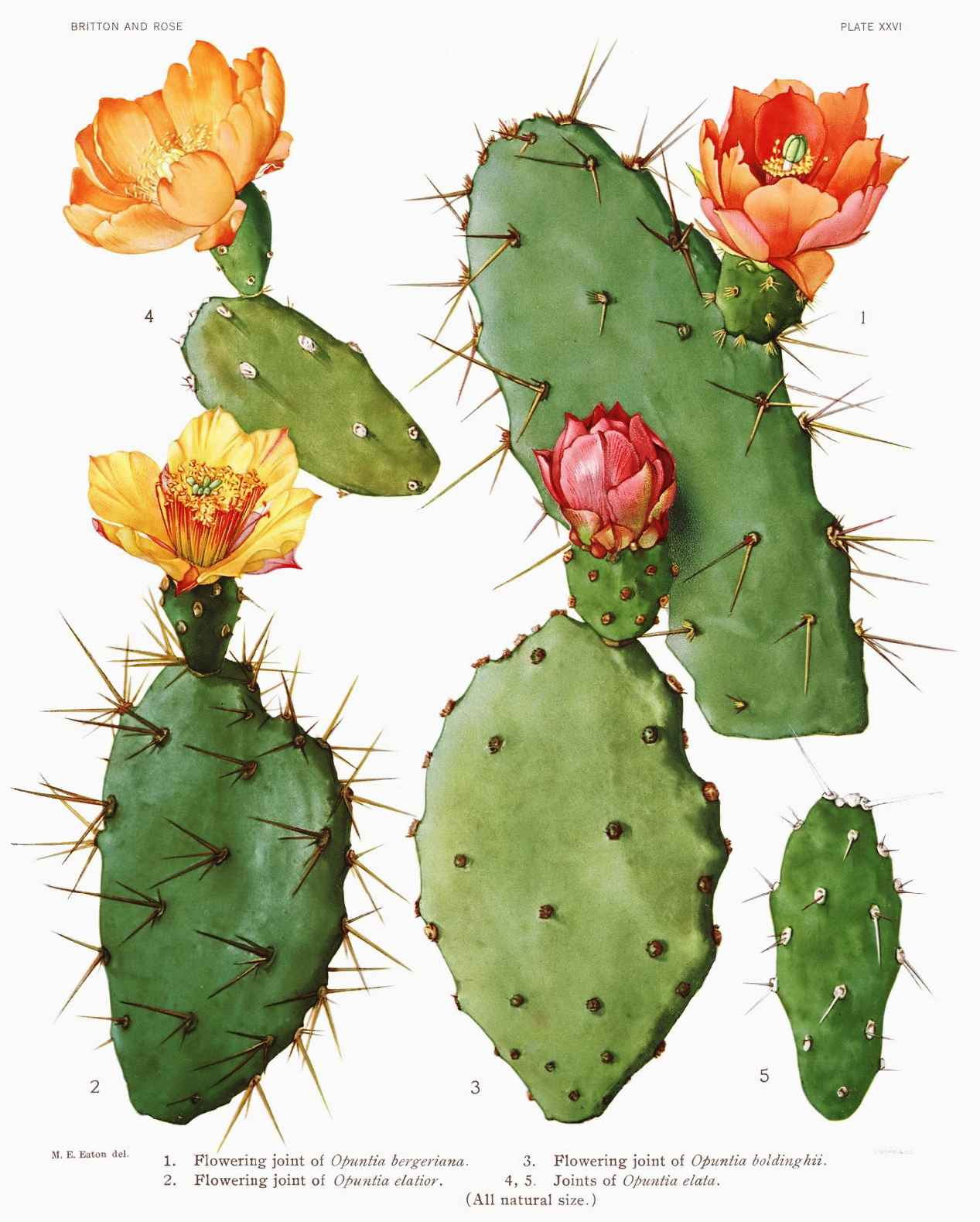 1,2. Opuntia elatior, 3. Opuntia boldinghii, 4,5. Opuntia elata.